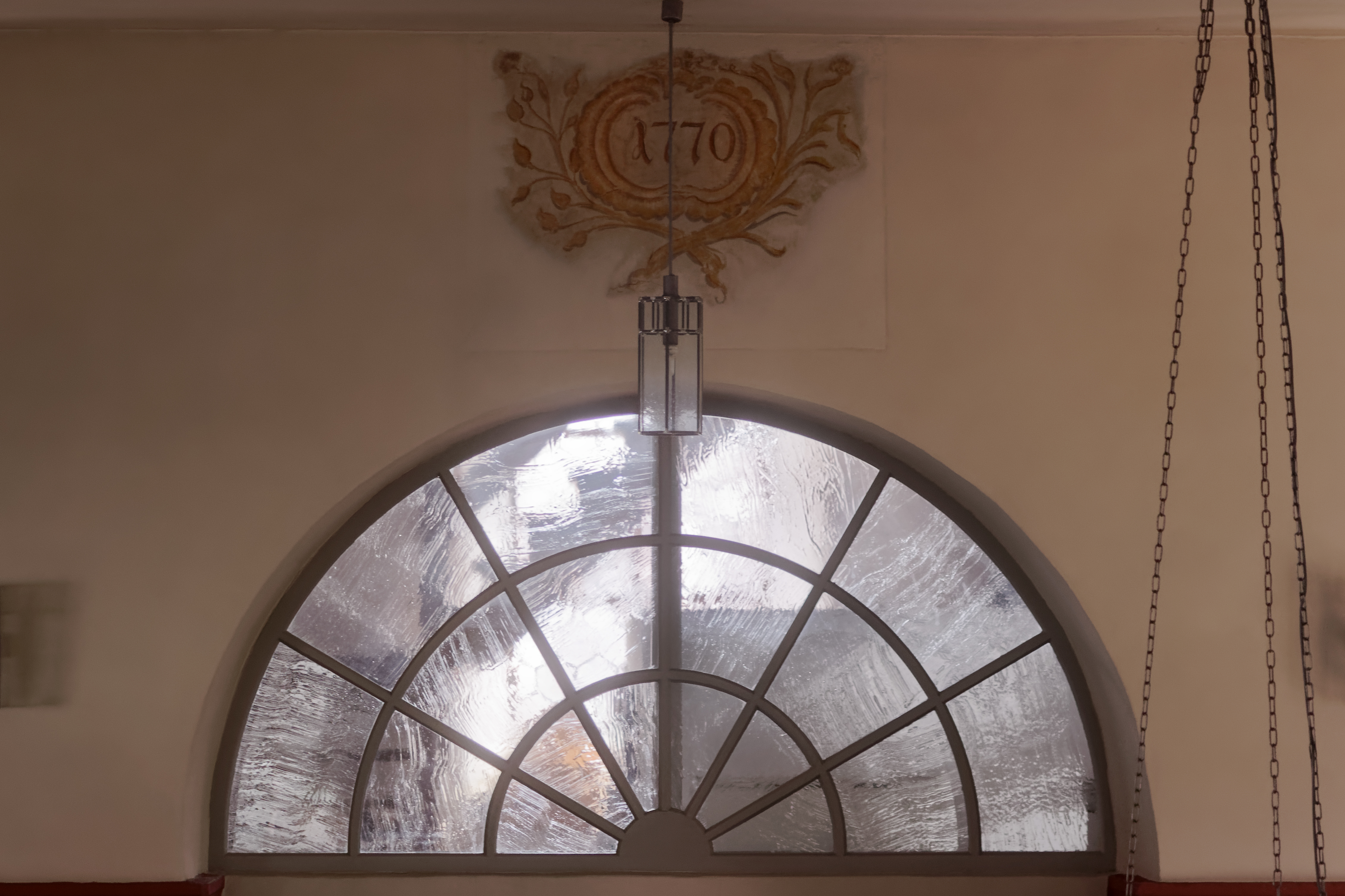 Evangelische Kirche in Dudenhofen, einem Stadtteil von Rodgau (Hessen): Fenster zwischen Empore und Kirchturm. Über dem Fenster befindet sich der Überrest einer ehemaligen Wandmalerei mit der Jahreszahl 1770, dem Einweihungsjahr der Kirche.